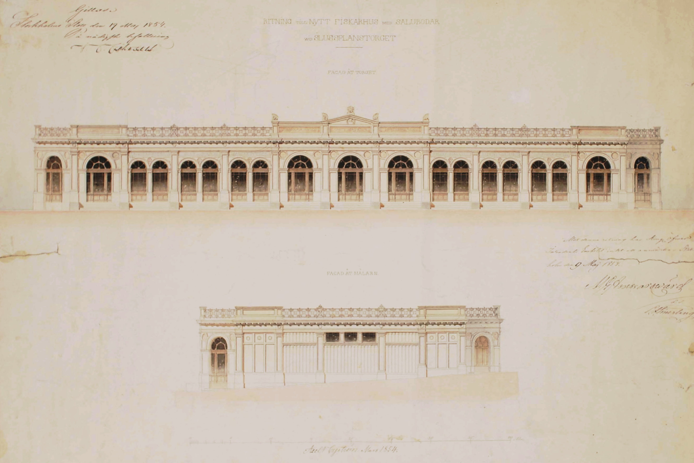 Nytt Fiskarhus på Karl Johans torg, ritning Axel Nyström